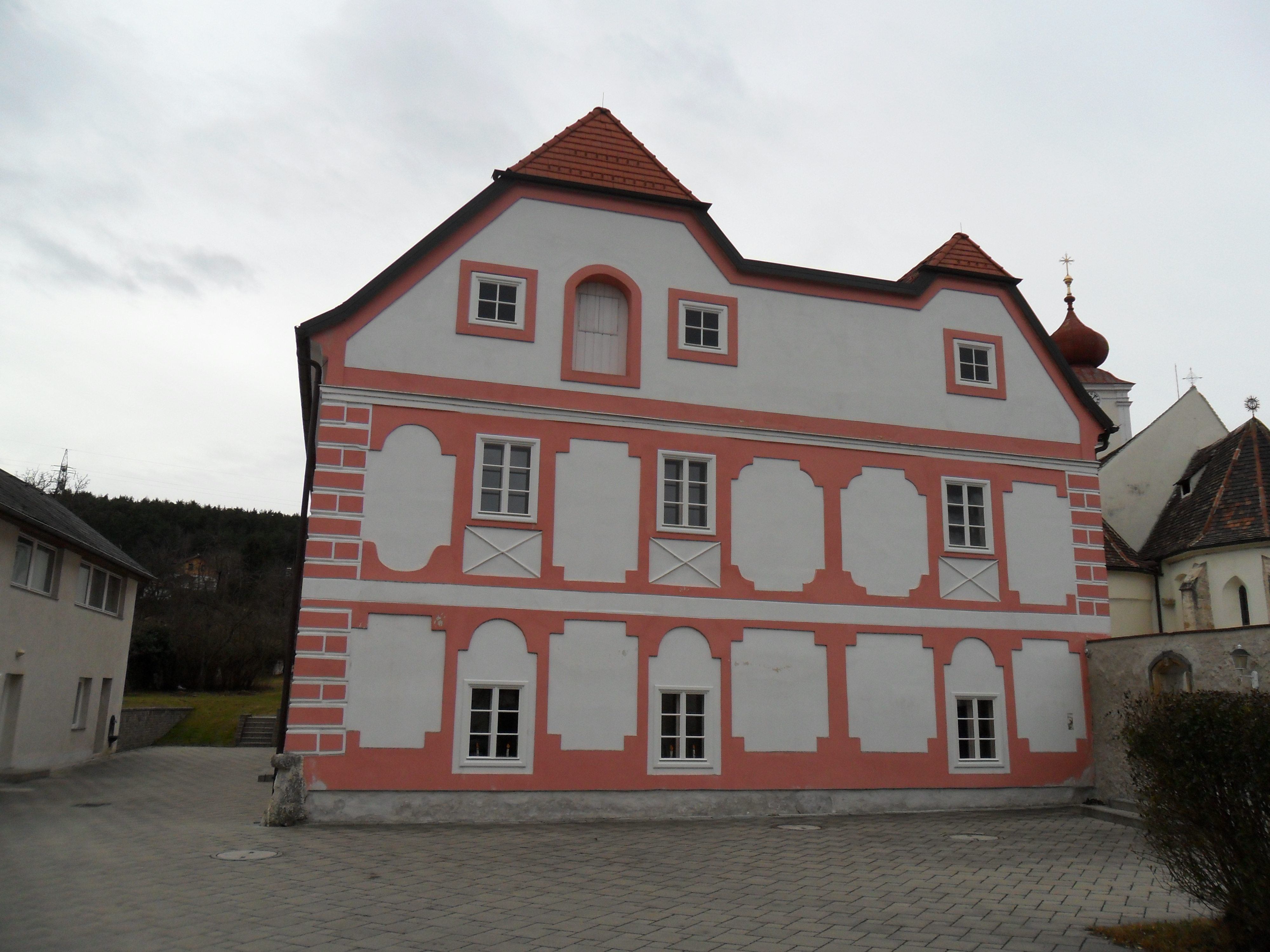 Pfarrhof der Pfarre St. Valentin-Landschach in der Gemeinde Grafenbach-St. Valentin